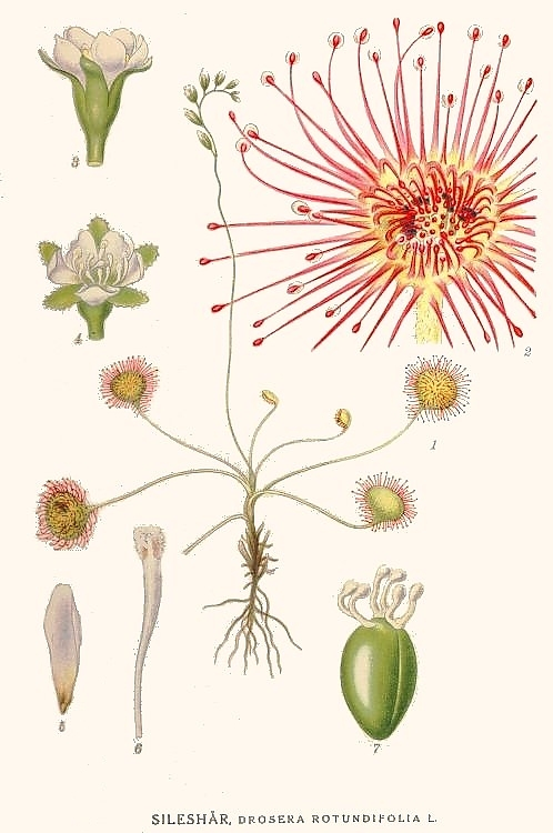 Original Description Sileshår, Drosera rotundifolia L.